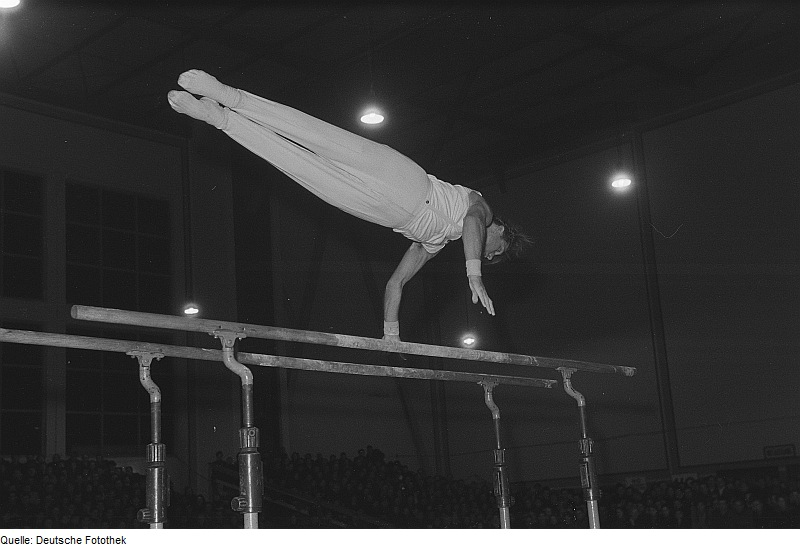 Original image description from the Deutsche Fotothek Bilderschliessung Turner bei einer Übung am Barren in Halle II